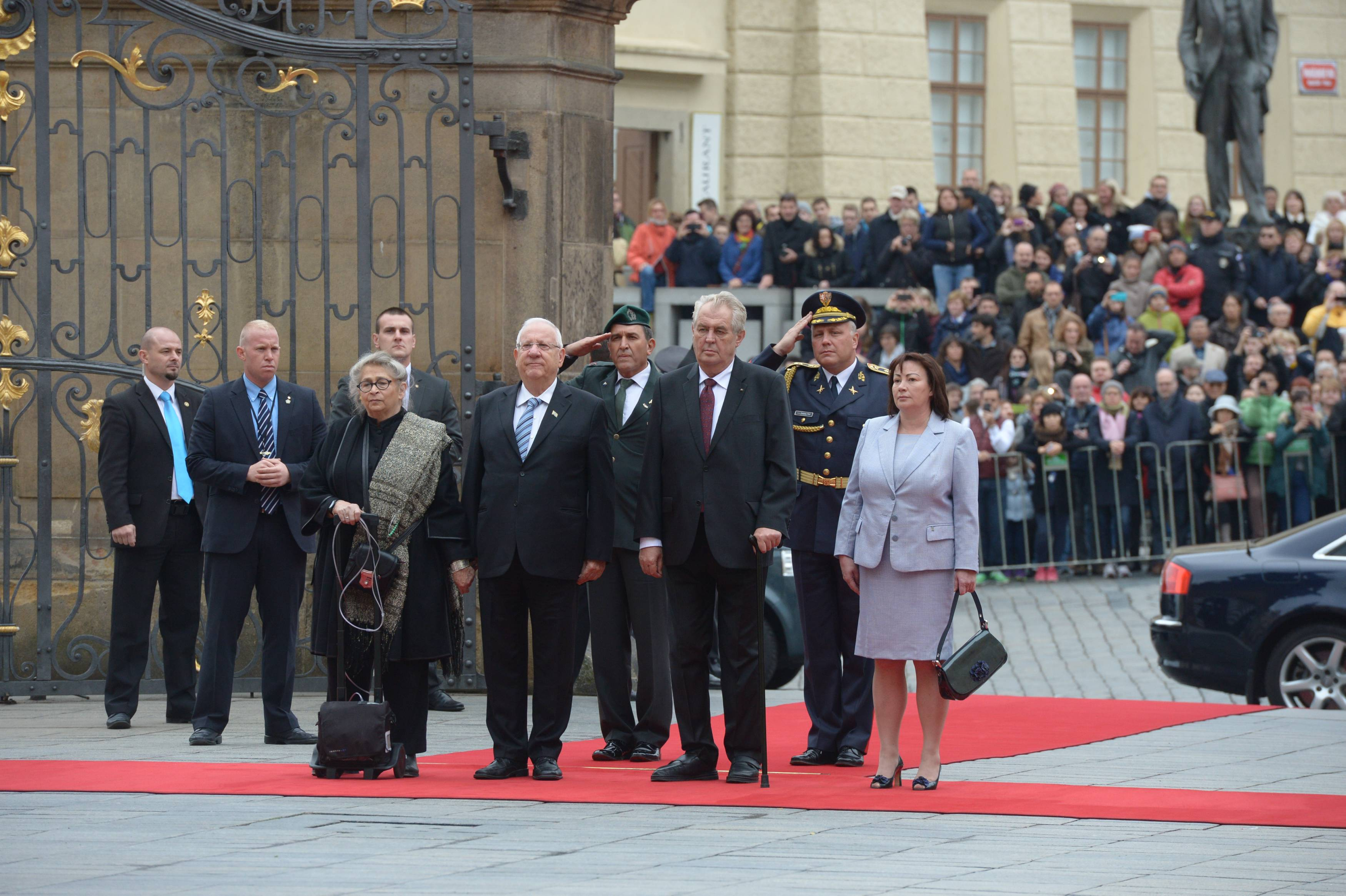 נשיא מדינת ישראל ראובן ריבלין בביקור רשמי בארמון הנשיאות של צ'כיה, מתקבל על ידי נשיא צ'כיה מילוש זמאן